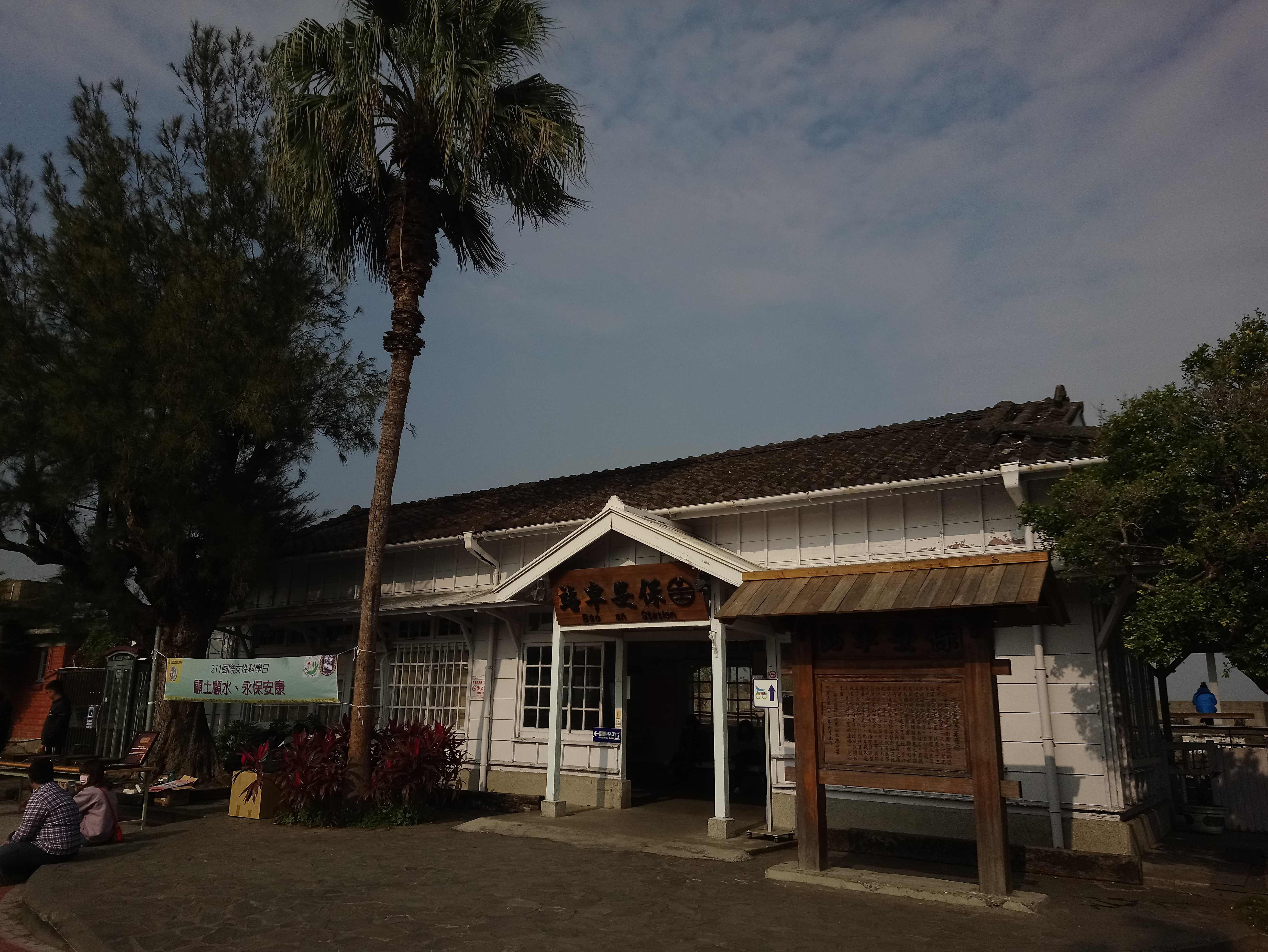 臺鐵保安車站全景,臺南市仁德區保安里